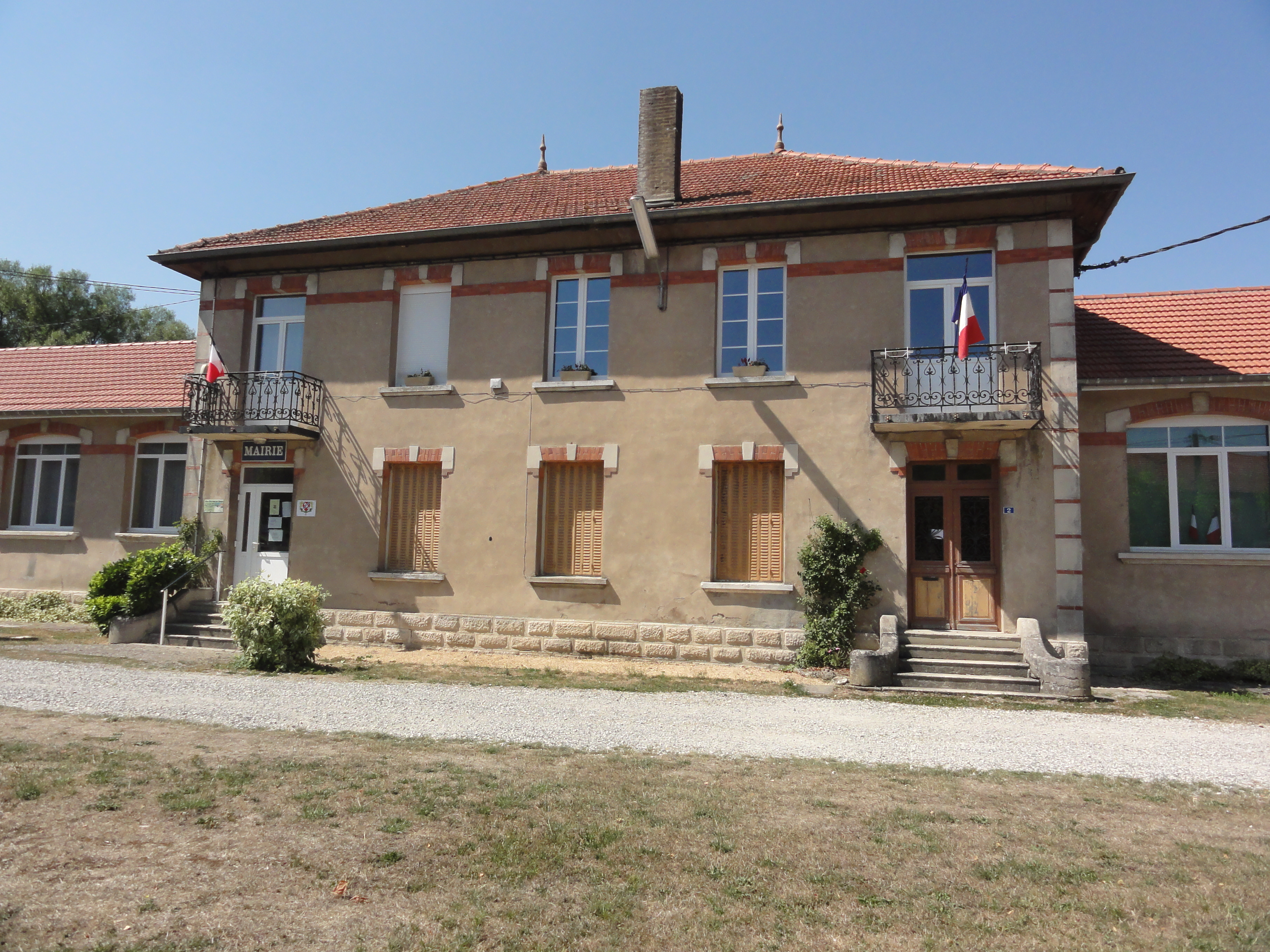 Esnes-en-Argonne (Meuse) mairie